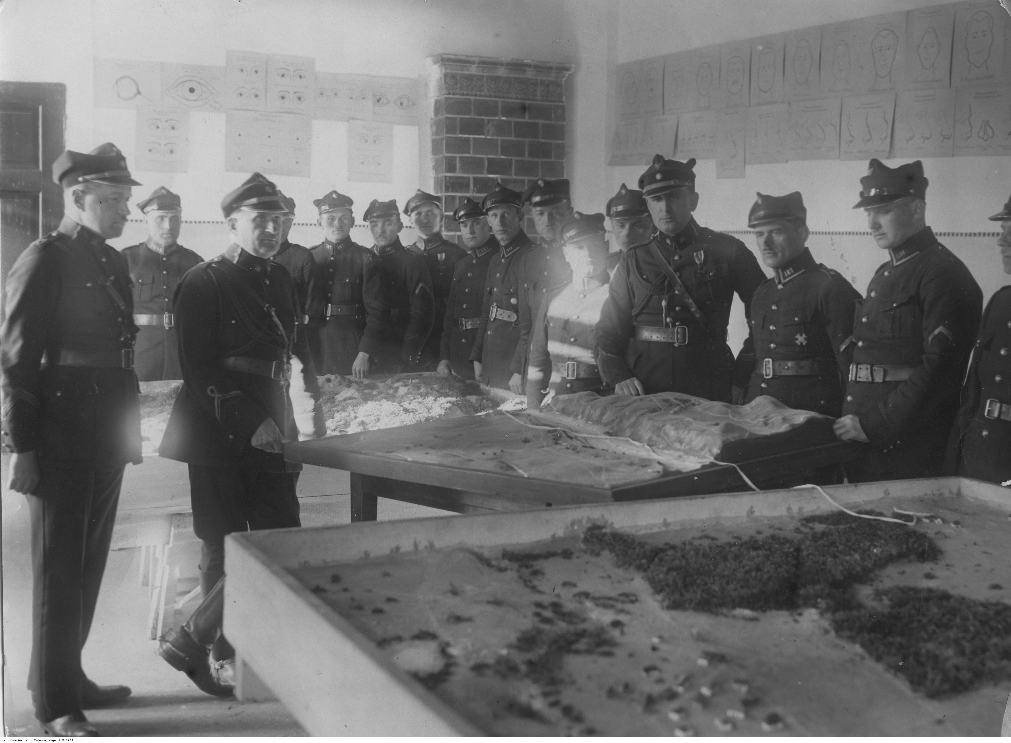 Centralna Szkoła Straży Celnej w Górze Kalwarii. Grupa szeregowych w sali wykładowej podczas zajęć. Koncern Ilustrowany Kurier Codzienny - Archiwum Ilustracji. Sygnatura: 1-G-6491